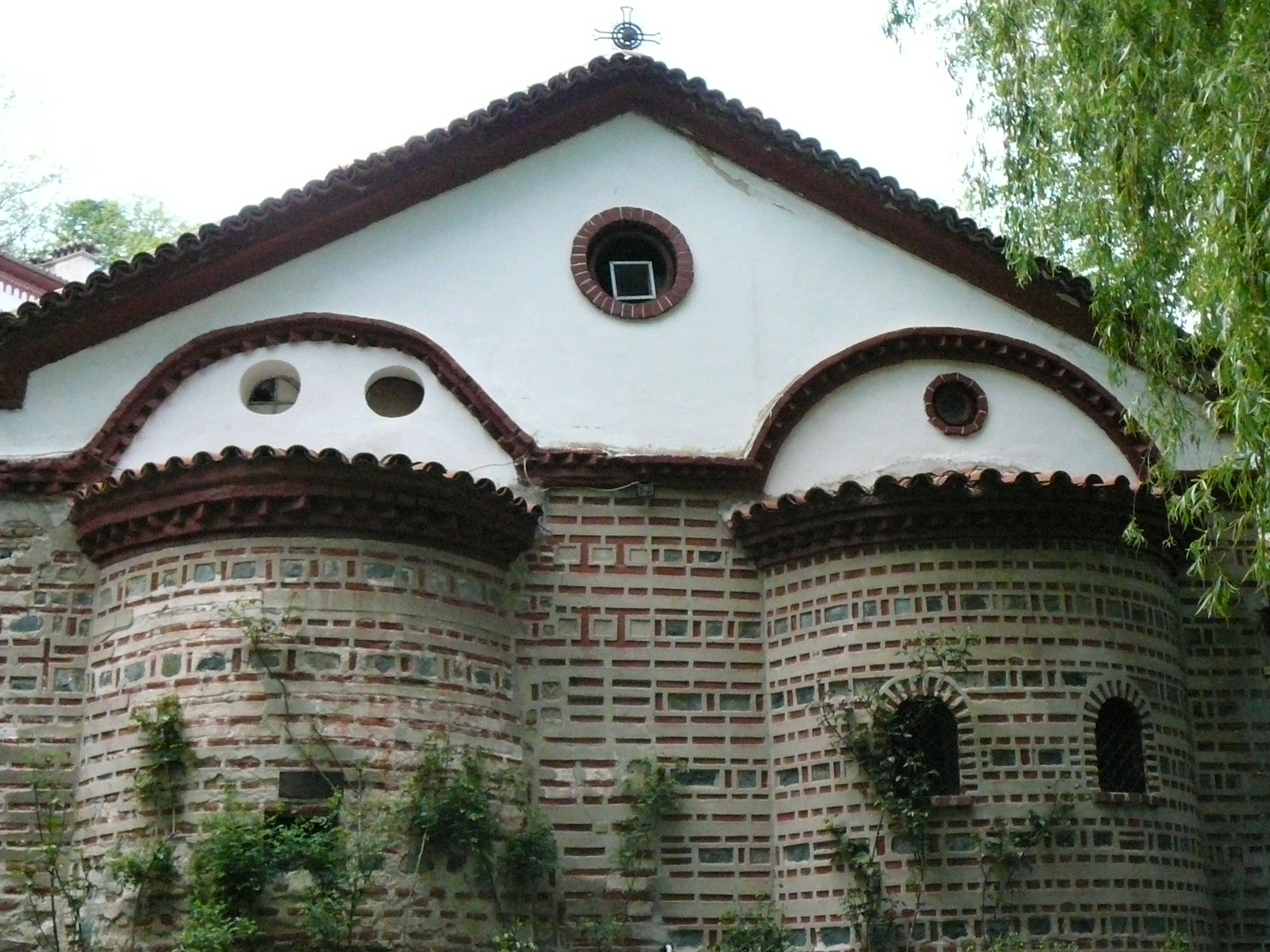 Dragalevci monastery,Sofia,Bulgaria